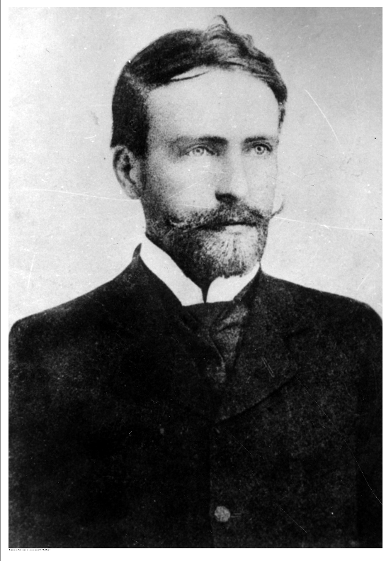 Портретна снимка на Станислав Виспянски, полски драматург, поет, художник, график и архитект.